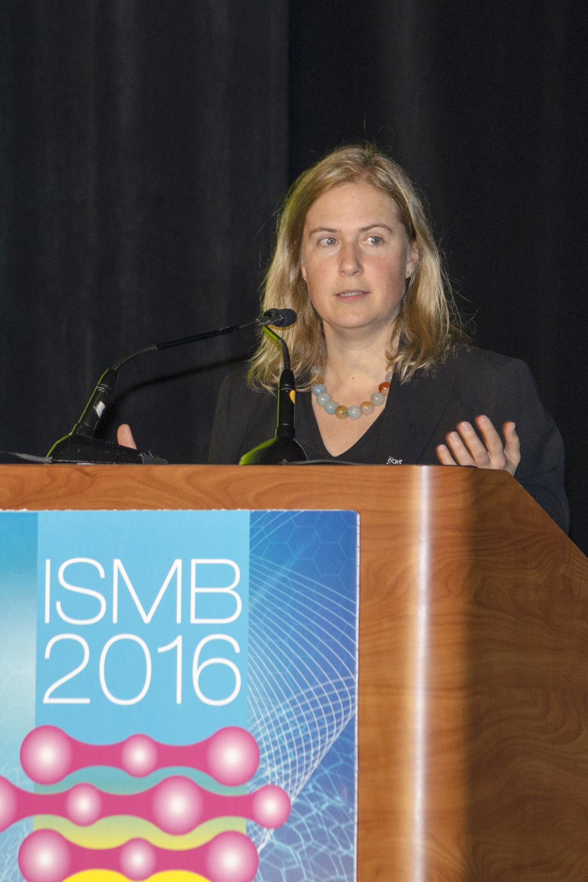 Sarah Teichmann speaking at ISMB 2016